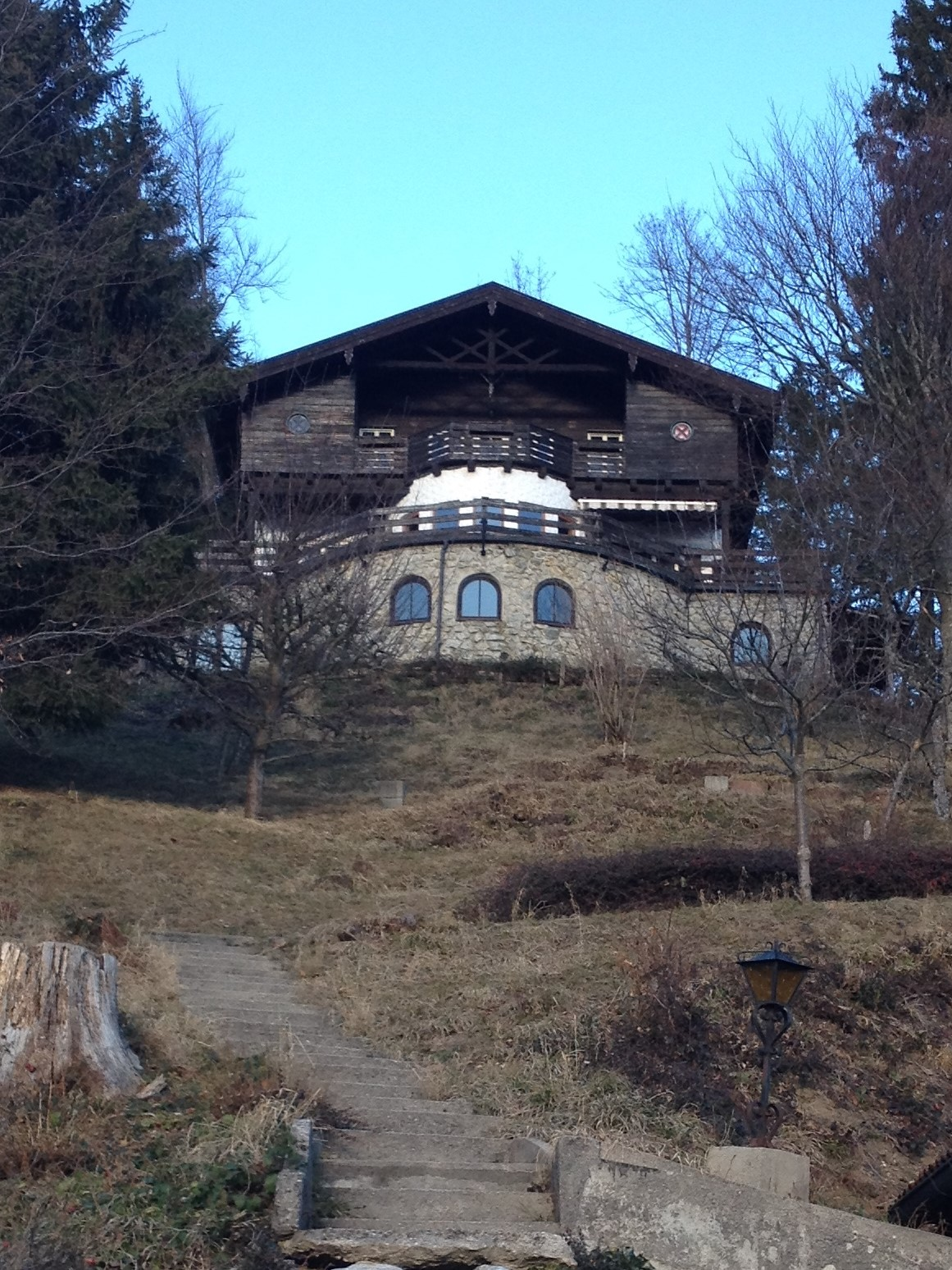 Hoch über dem Schliersee gelegen verfügt das Mitte der 1930er Jahre erbaute Landhaus von Wilhelm Grimm über einen weiten unverbauten Blick. Mit seinem schwer massiven Steinsockel und dem opulenten Einsatz von Holz ist ein Musterbeispiel für das Bauen in den Bergen dieser Epoche. Die flankierenden Rundfenster im Obergeschoß zeugen bis heute von der Gesinnung des Bauherrn.